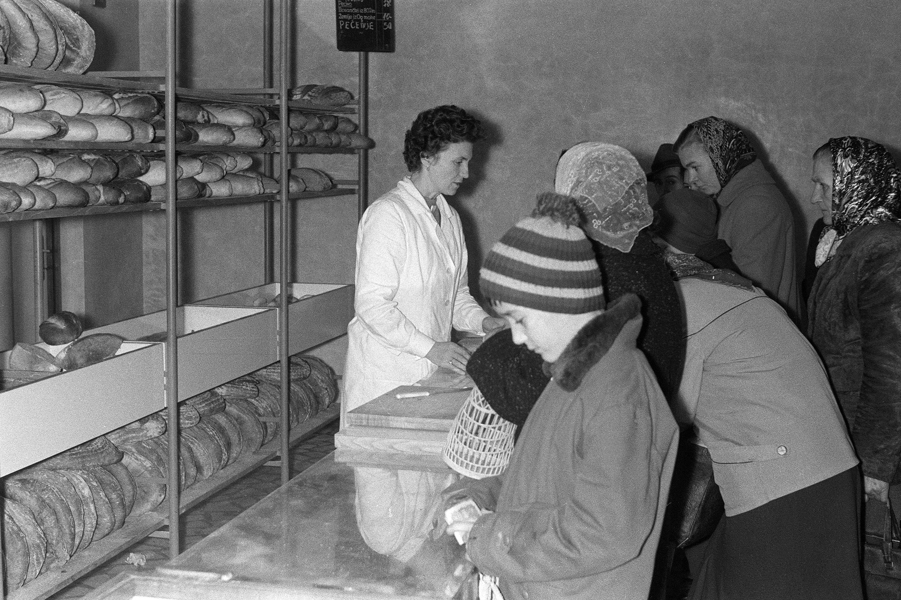 Nova pekarna v Slovenj Gradcu.